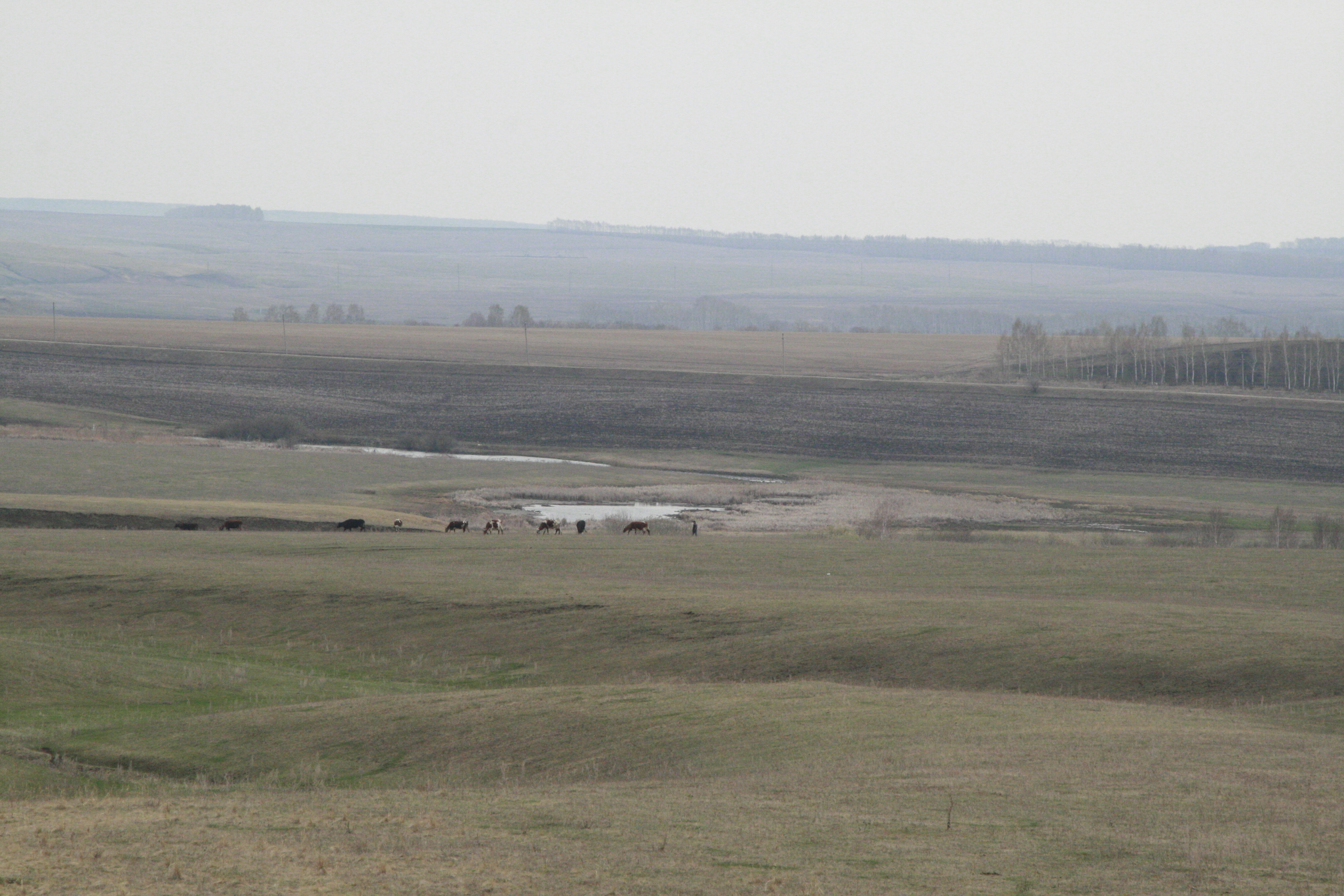 Акчарлак куле